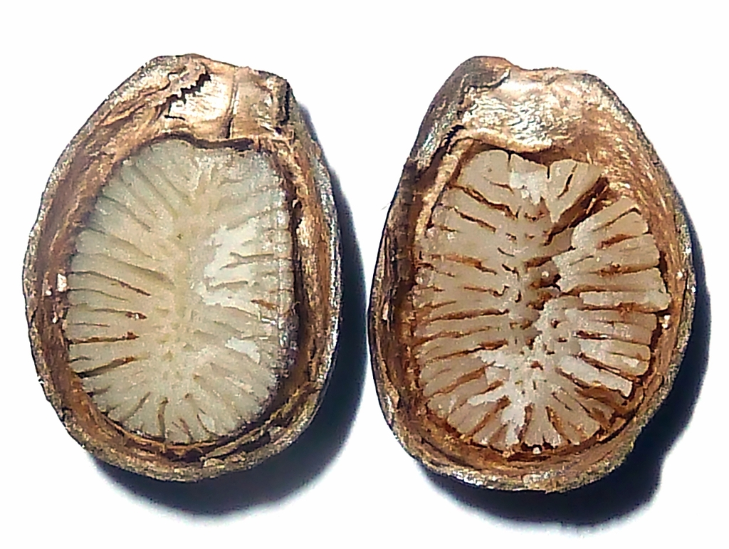 Annona cherimola (chirimoya ) : Semilla suelta - corte ecuatorial evidenciando el endocarpo y el tegumento penetrando las fisuras (ruminaciones laminiformes) del endosperma.